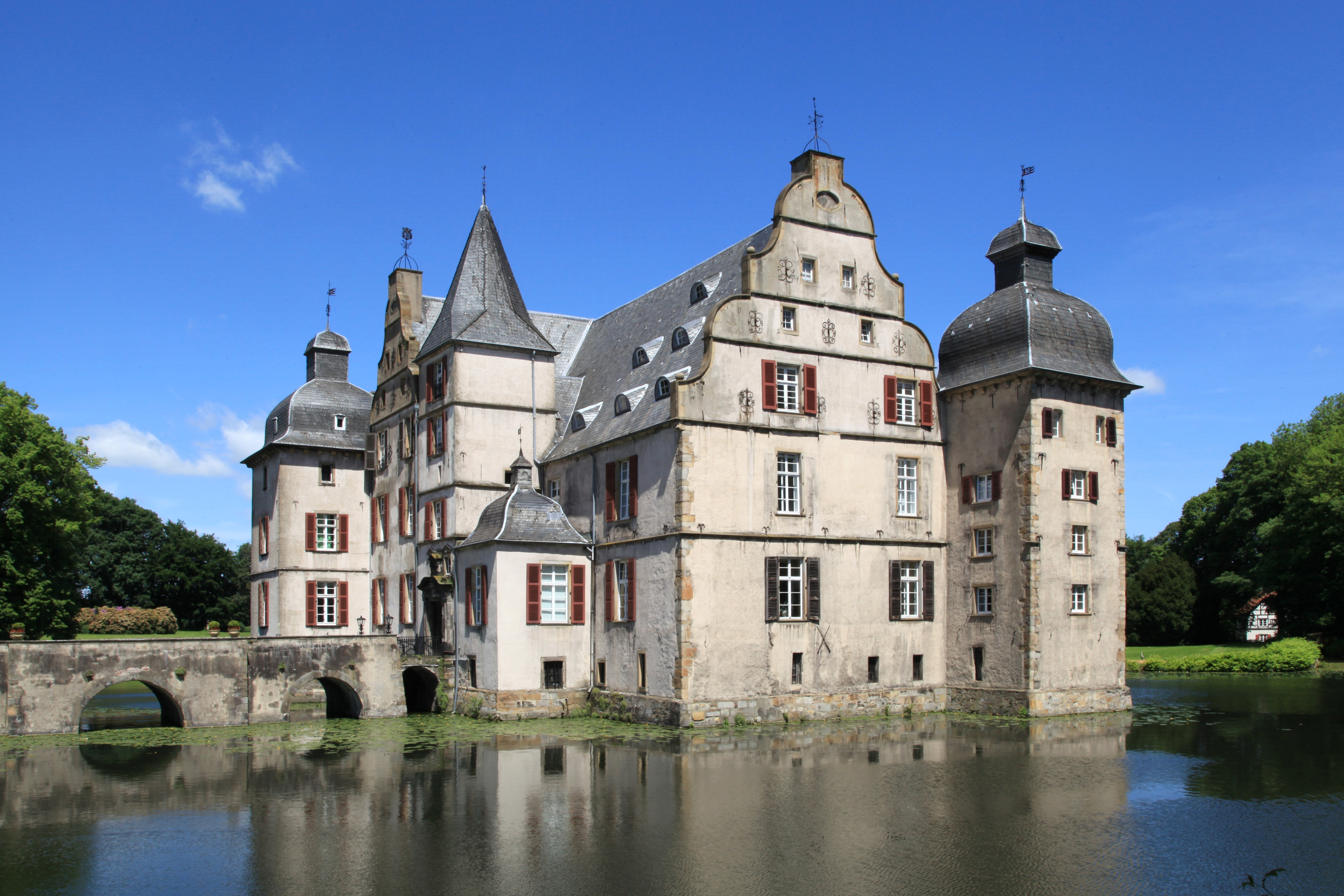 Wasserschloss Haus Bodelschwingh, Schloßstraße in Dortmund